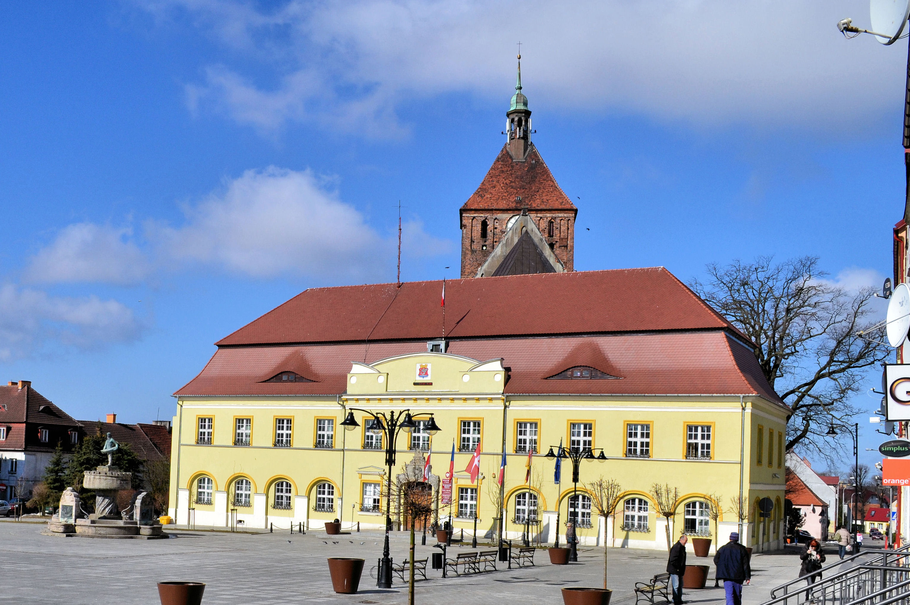 Rynek w Darłowie